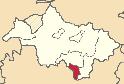 Mapa localizacor del cantón en Cañar, Ecuador